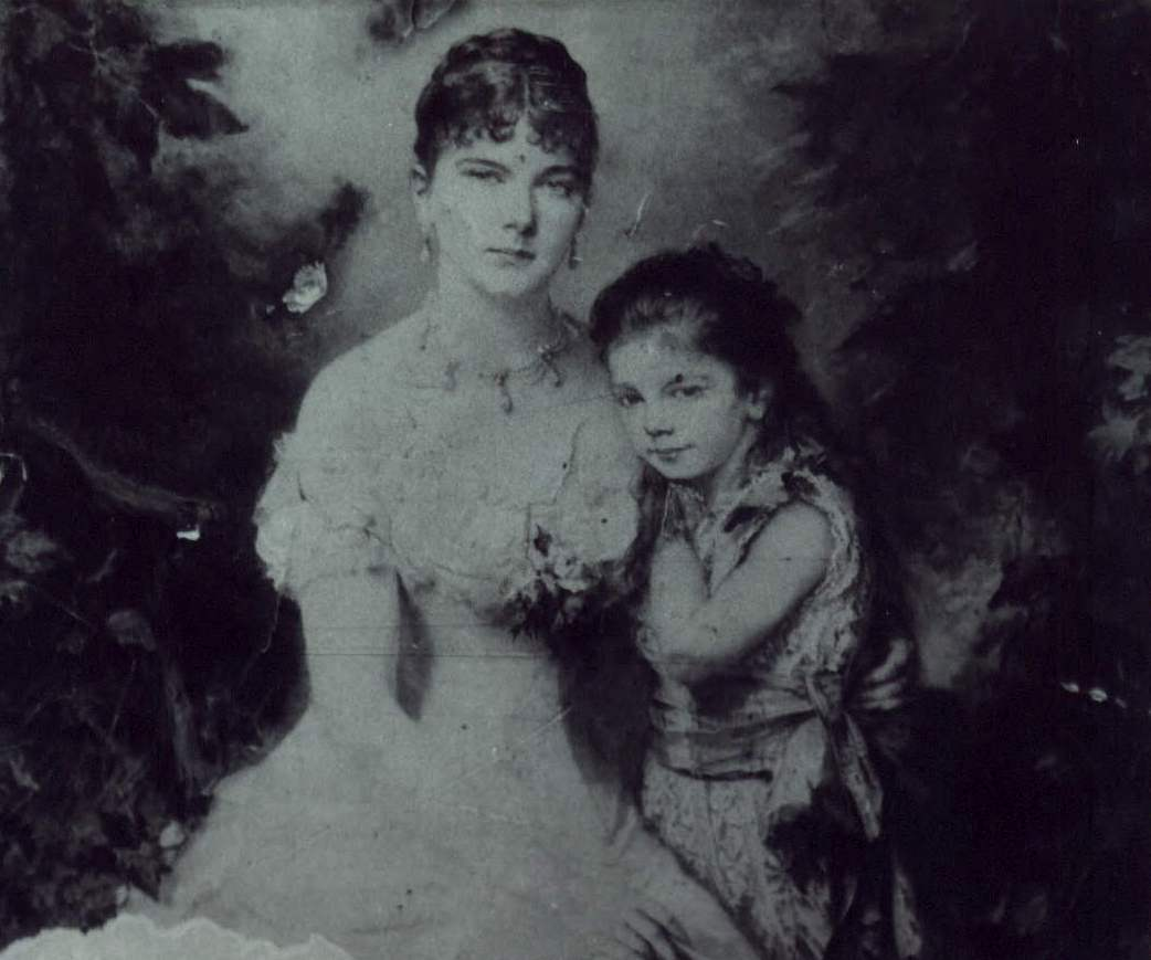 Беларуская (тарашкевіца): Сёстры Альжбета і Алена Радзівіл, паводле А. Мальдзіс. Тайна портрета княгини-"холопоманки" // "Советская Белоруссия" № 242 (23884), 20.12.2011.